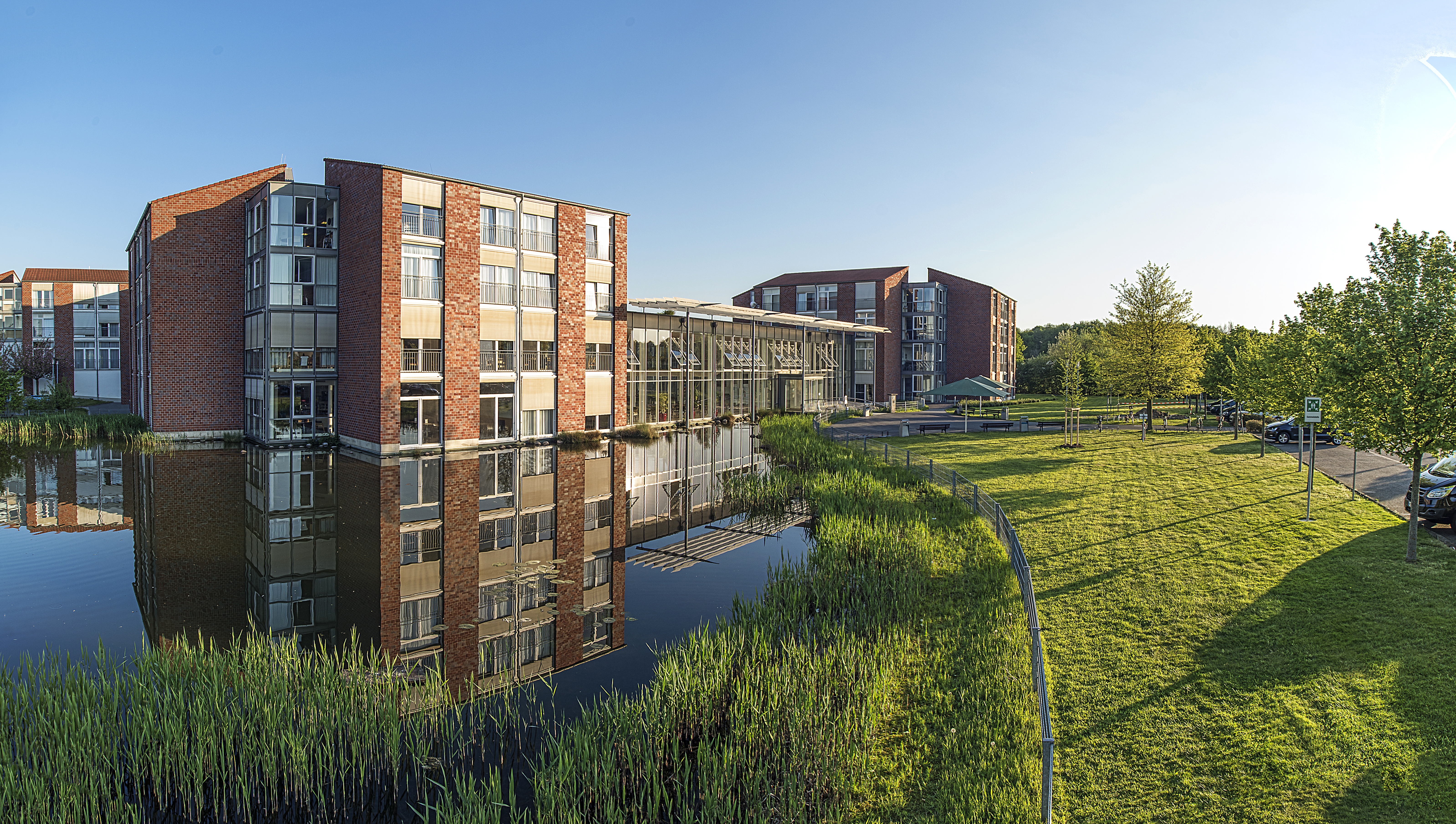 Mauritius